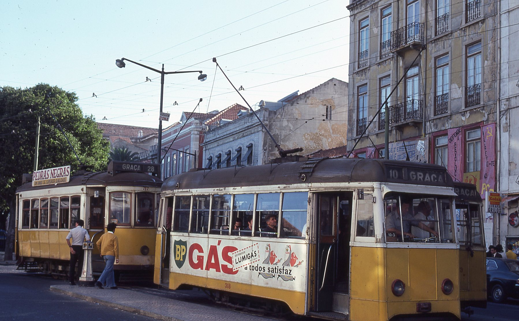 Photo: Trams aux Fils. Prise en 1977 Ligne 10, direction GRAÇA (ligne disparue le 5 mars 1984 après fusion avec la ligne 28 Rua da Graça Tram 318 de la série 283 à 322, il n'existe plus, mais il reste le 320 au musée des trams de Lisbonne.